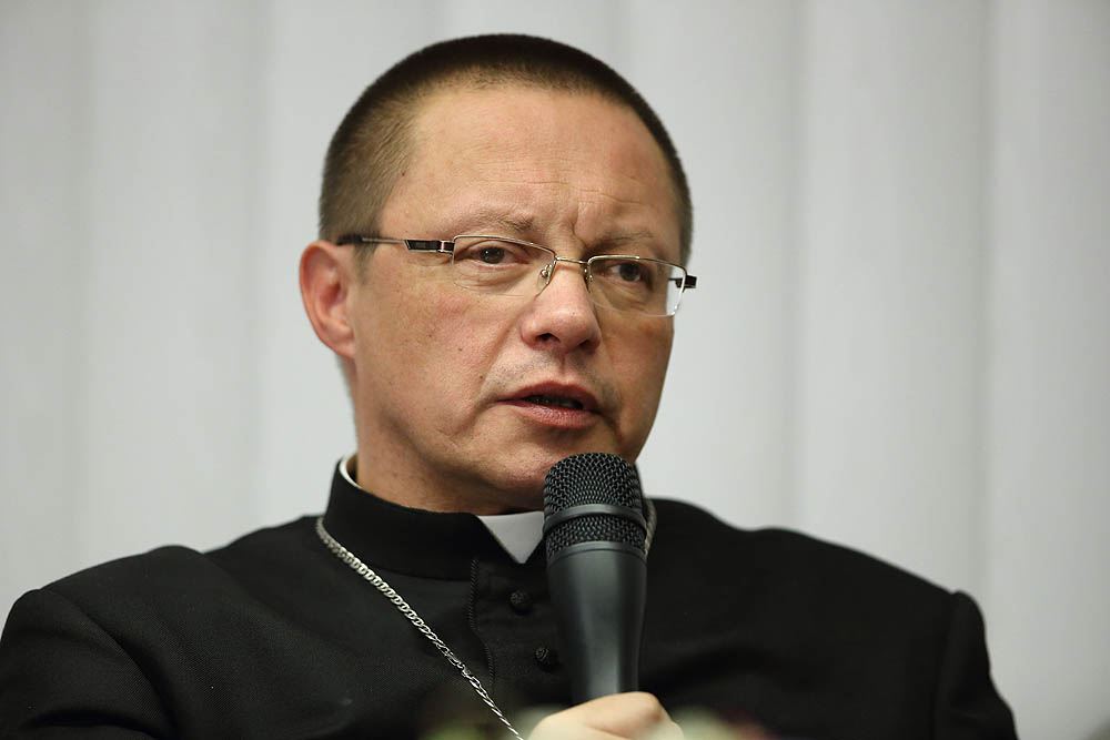 Grzegorz Ryś